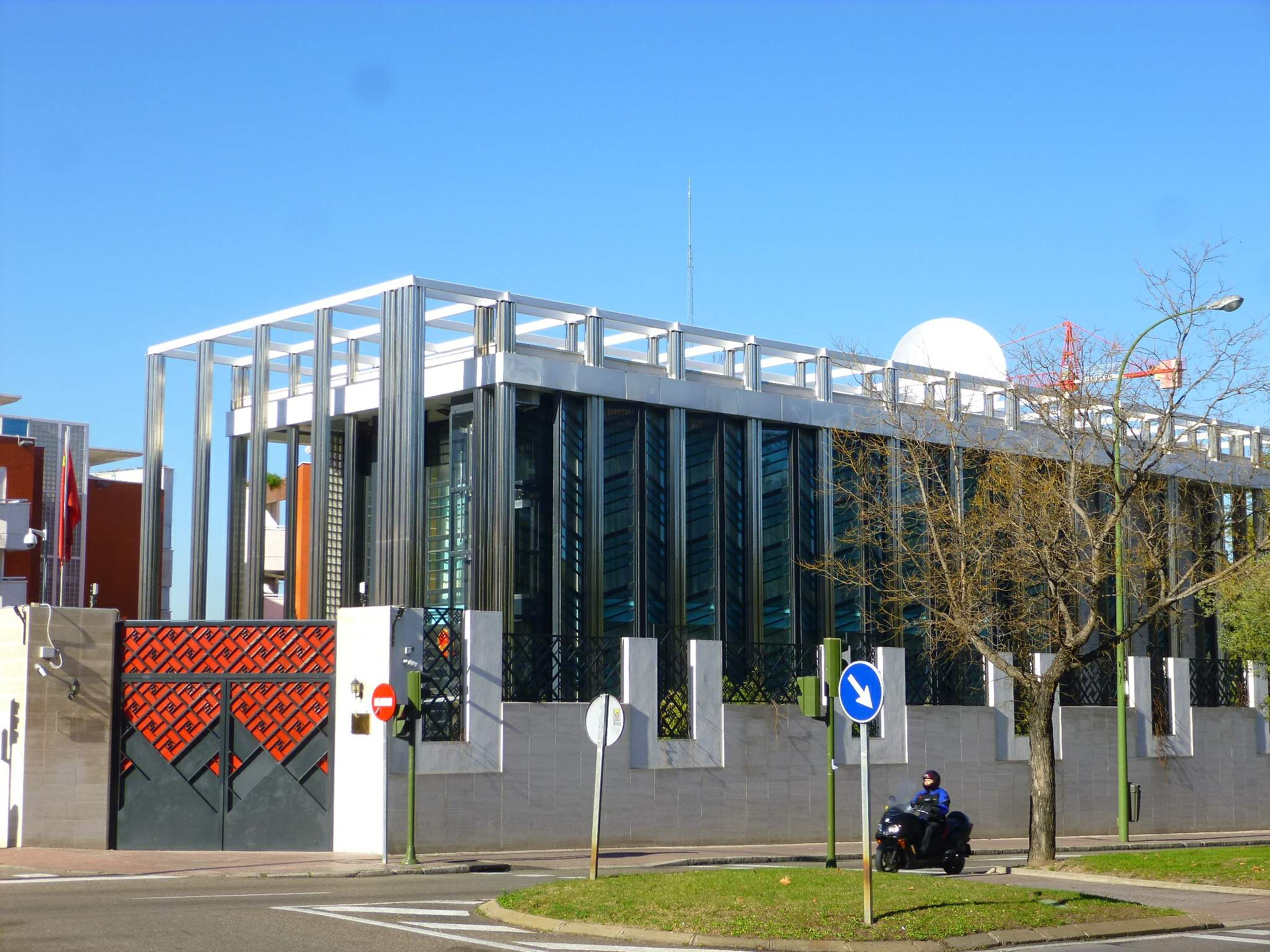 Madrid - Calle Arturo Soria, Embajada de China